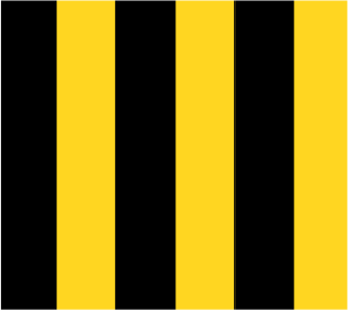 Bannière fascée de 6 pièces or et sable, dessinée pour usage personnel